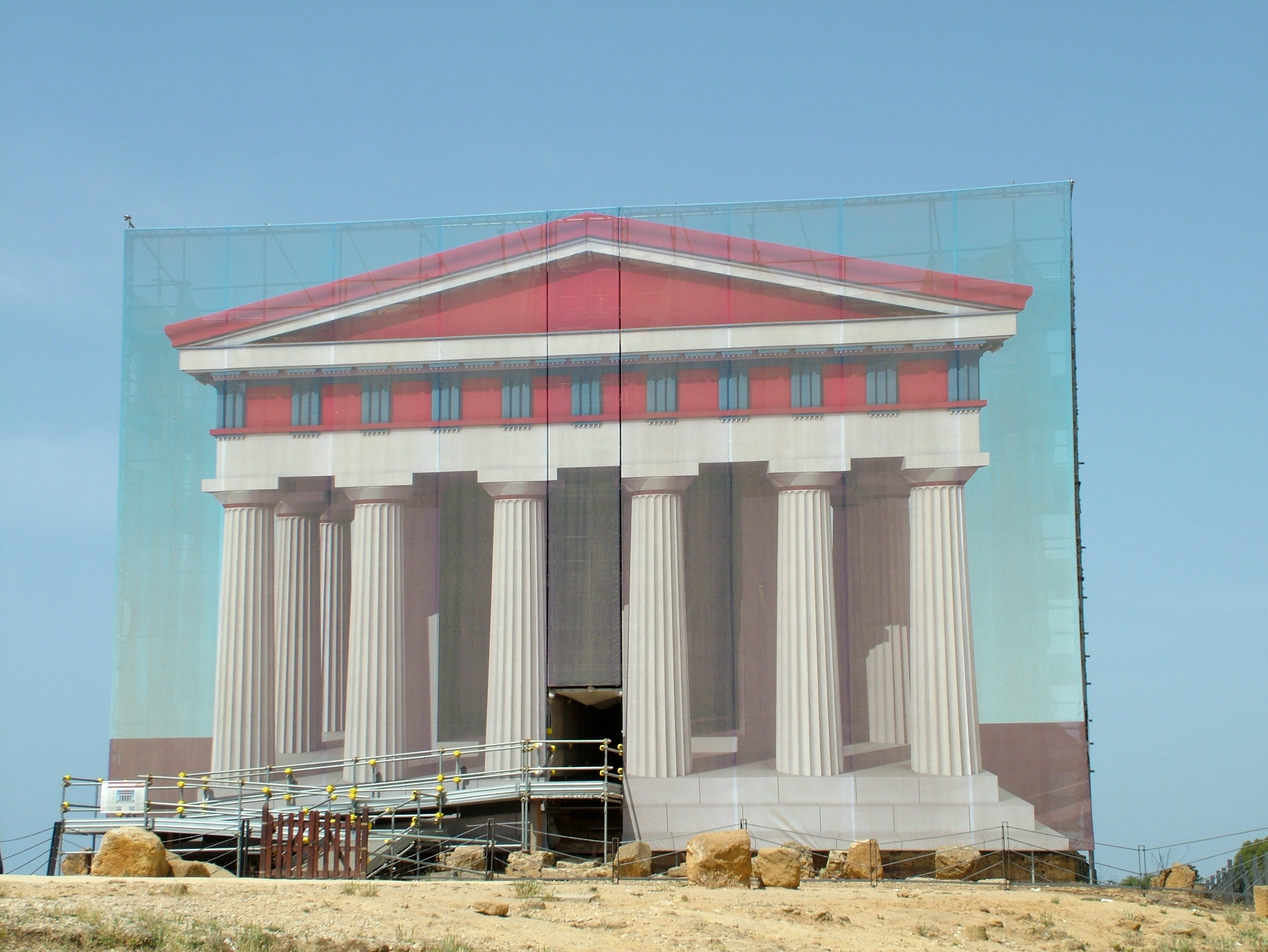 Agrigent, Valle dei Templi, Der Concordia-Tempel mit einem Gerüst und einem Bild der Restaurierung